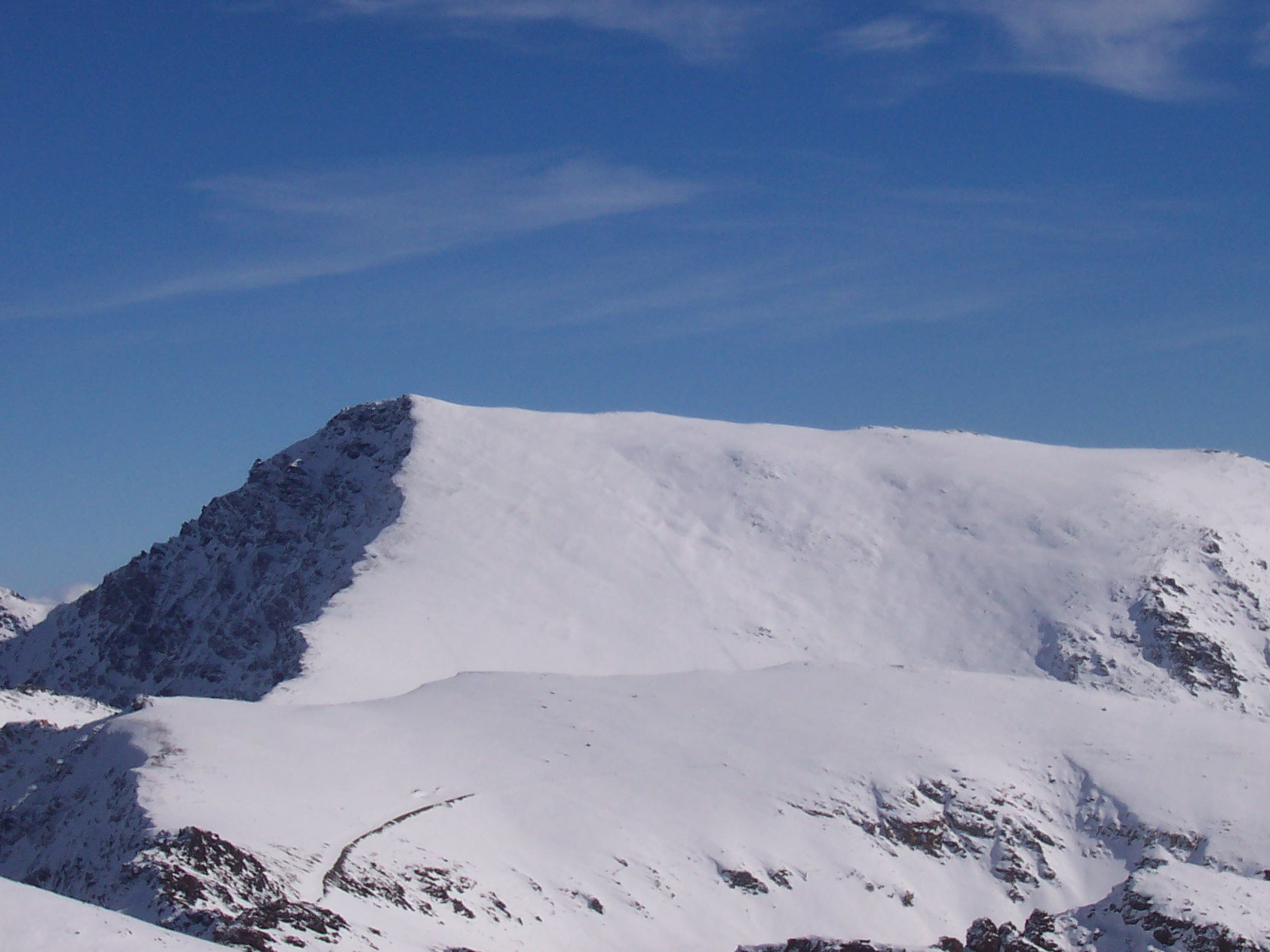 Der Mulhacén im Winter von Westen aus gesehen